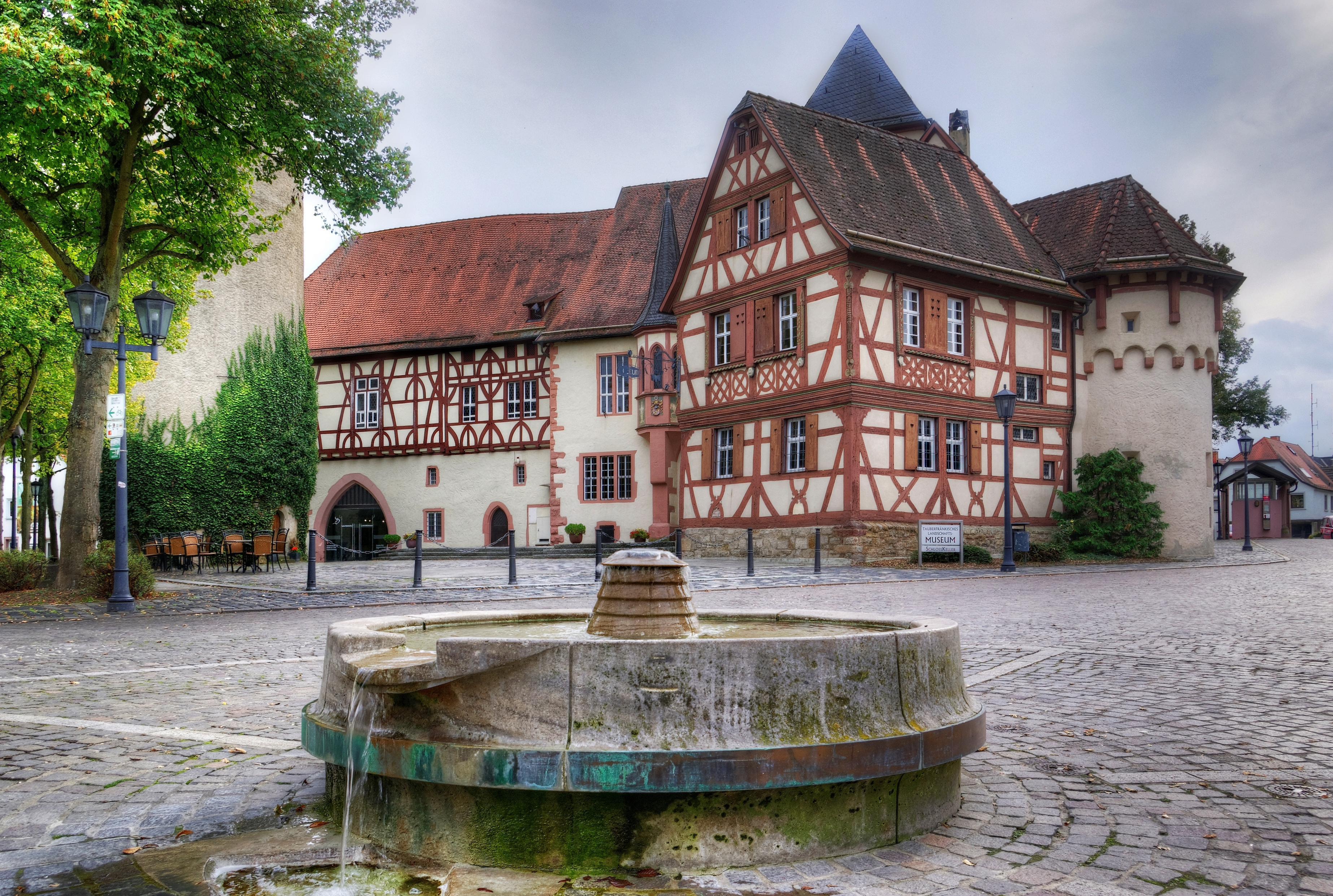 Tauberbischofsheim, Kurmainzisches Schloss